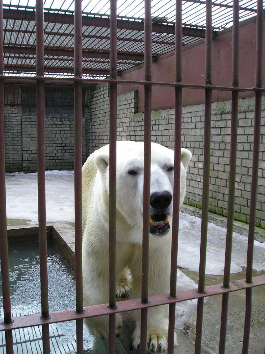 Jääkaru Franz Tallinna Loomaaias.